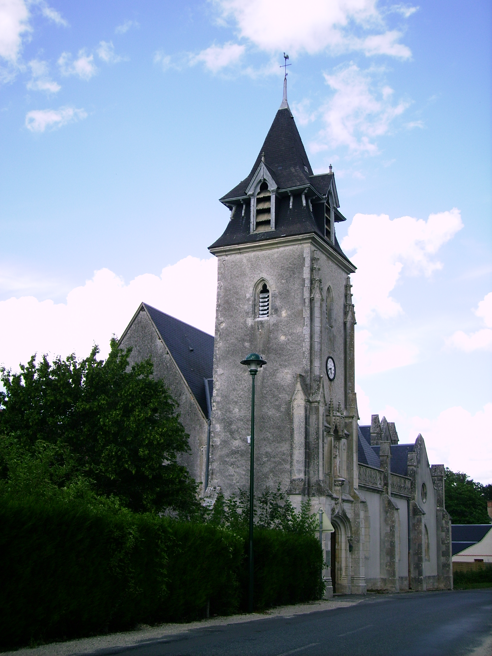 L'Eglise de Mézières-lez-Cléry.